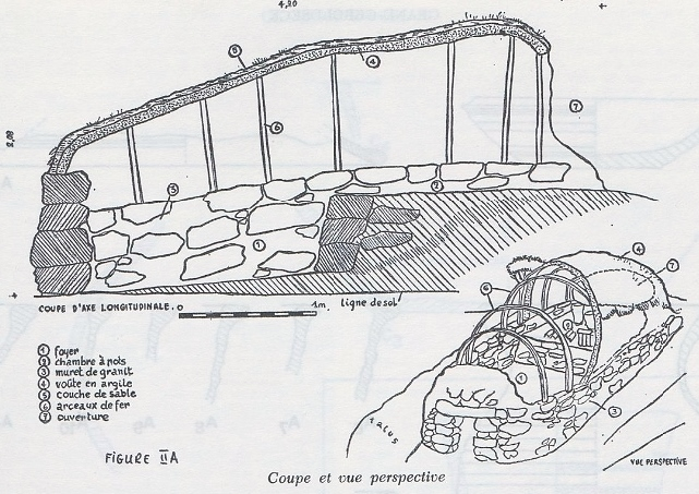 Coupe et vue perspective d'un four utilisé par les potiers de Lanveur (en Lannilis et Plouvien).